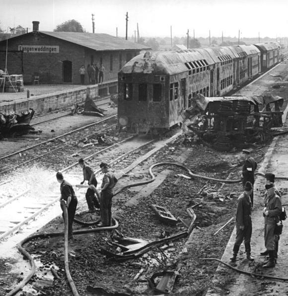 Title: Langenweddingen, Eisenbahnunglück Factual corrections and alternative descriptions are encouraged separately from the original description. Additionally errors can be reported at this page to inform the Bundesarchiv. Original historic description: Zentralbild Koard 6.7.1967 Folgenschweres Verkehrsunglück im Bezirk Magdeburg Ein folgenschweres Verkehrsunglück ereignete sich am Morgen des 6.7.1967 in unmittelbarer Nähe des Bahnhofs Langenweddingen, Kreis Wanzleben, Bezirk Magdeburg. An dem dort befindlichen beschrankten Bahnübergang stieß der aus Richtung Magdeburg kommende Personenzug 852 mit einem Tankfahrzeug des VEB-Minol zusammen, wobei die Benzinladung explodierte. Ubz.: Einen Blick auf die Unglücksstelle am Bahnhof Langenweddingen während der Bergungsarbeiten.